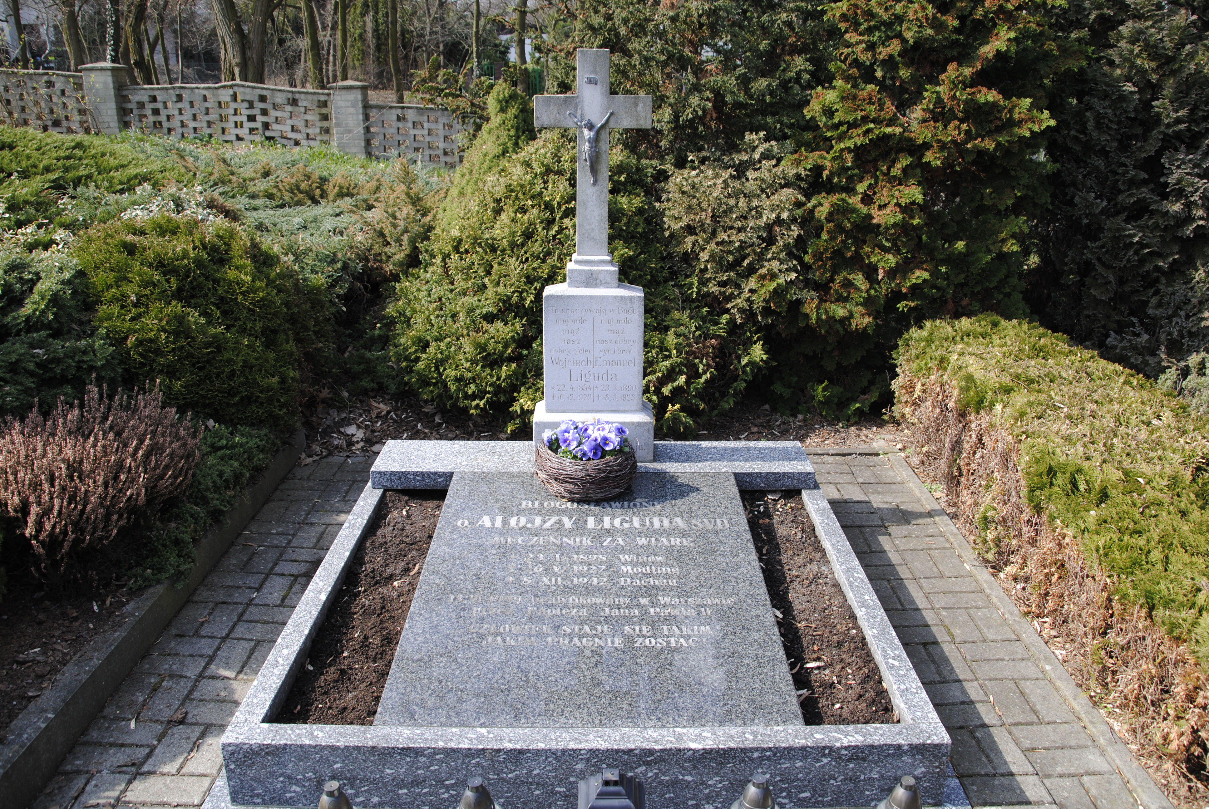 Grab von Alojzy Liguda in Winau/Oberschlesien (Winów)